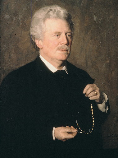 Gustaf Retzius (1907) (Målning av Emil Österman på Svenska Läkaresällskapet)